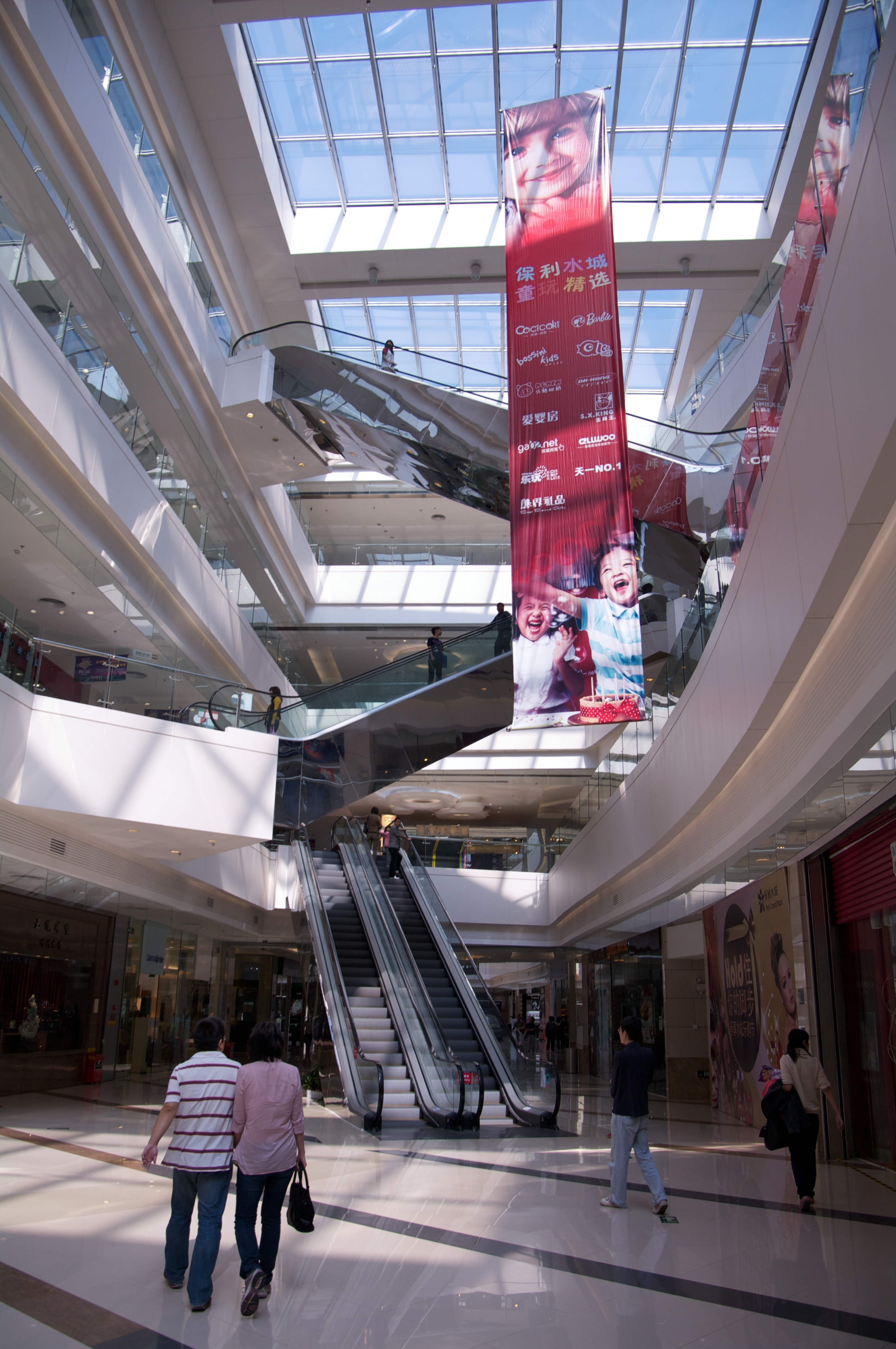 桂城街道内一个比较有影响力的购物中心，南海书店、永萌百货、永旺商城皆为于里面。